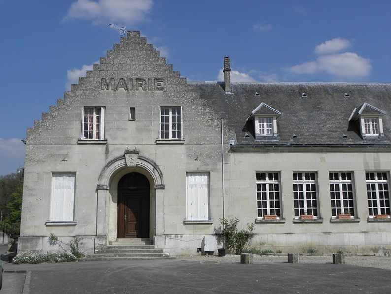 Mairie de Longpont (02).